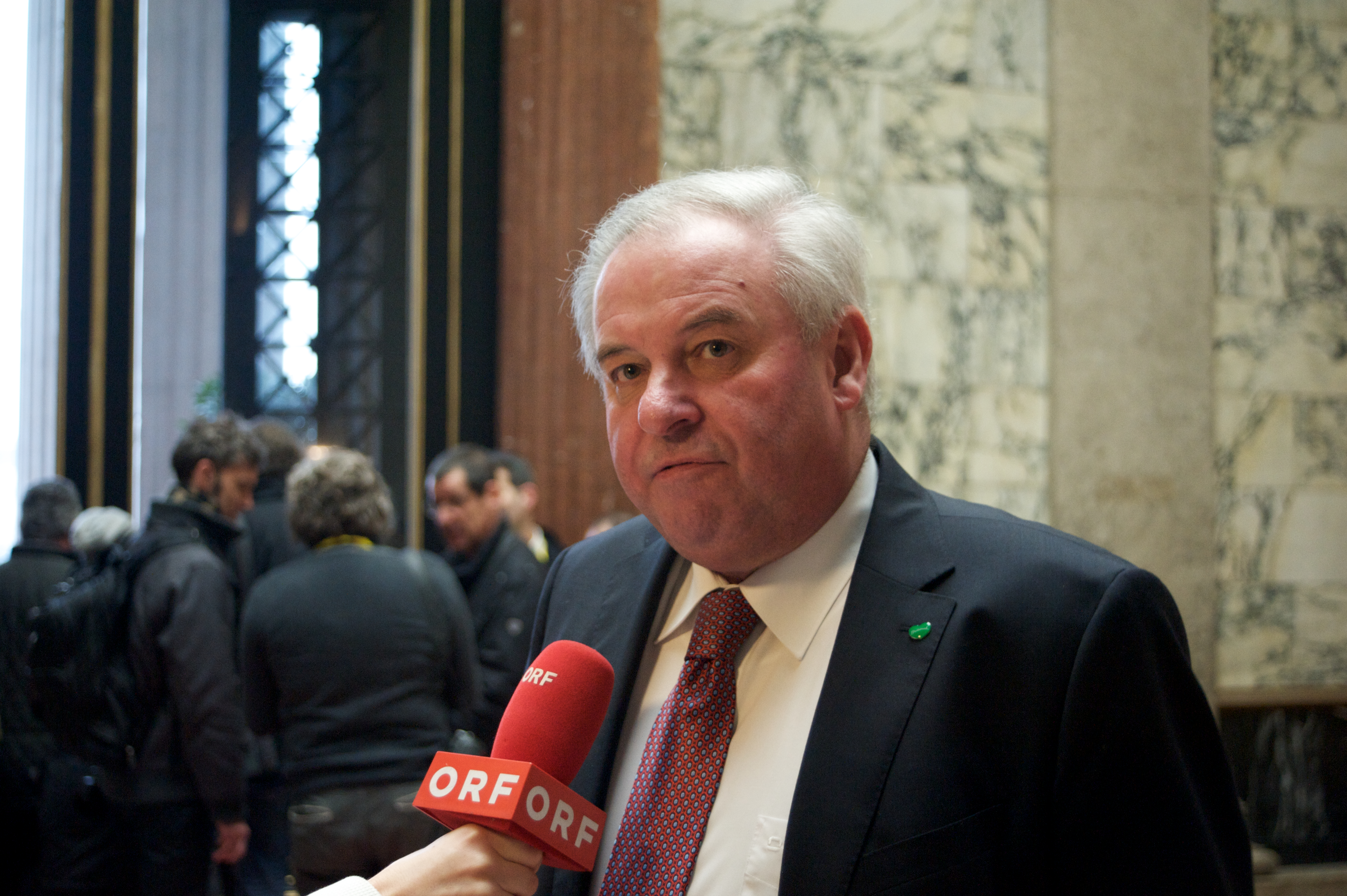 Landeshauptmann Hermann Schützenhöfer (_IMG7653)